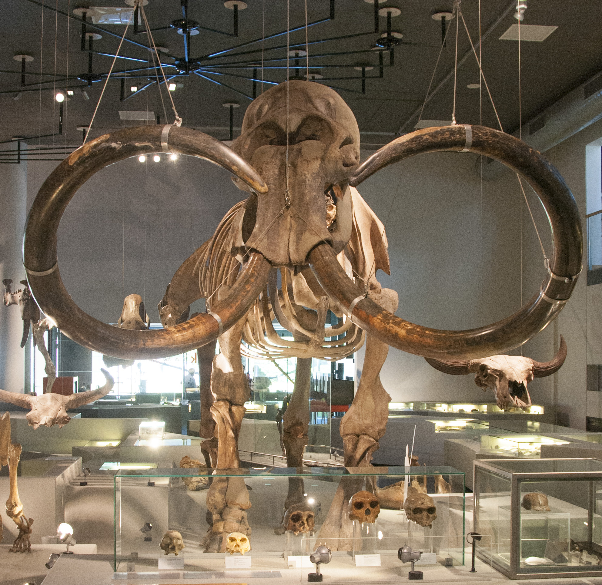 Skelet van en Mammoet in museum Naturalis, Leiden, NL